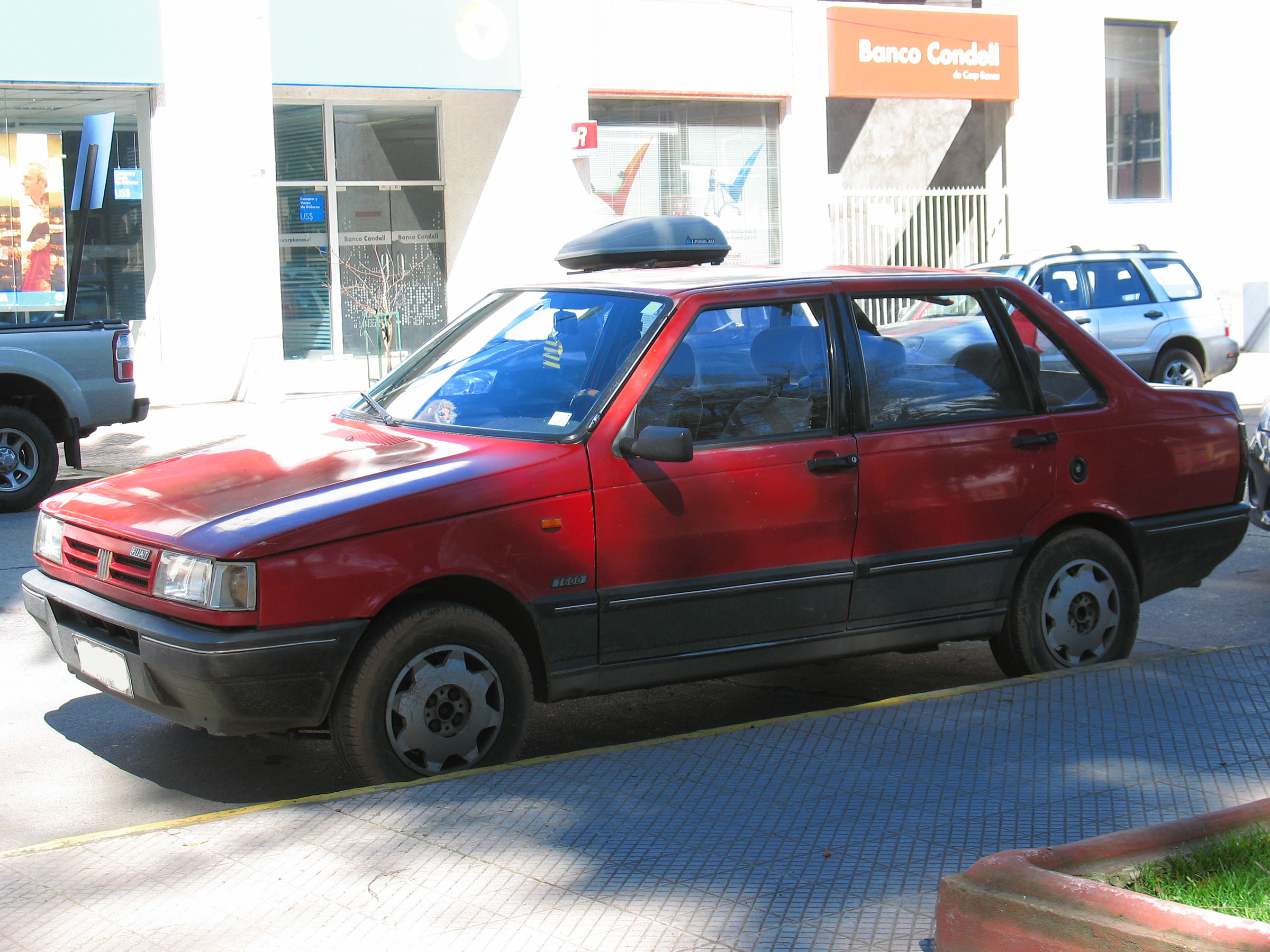 Fiat Duna 1600 SE 1992